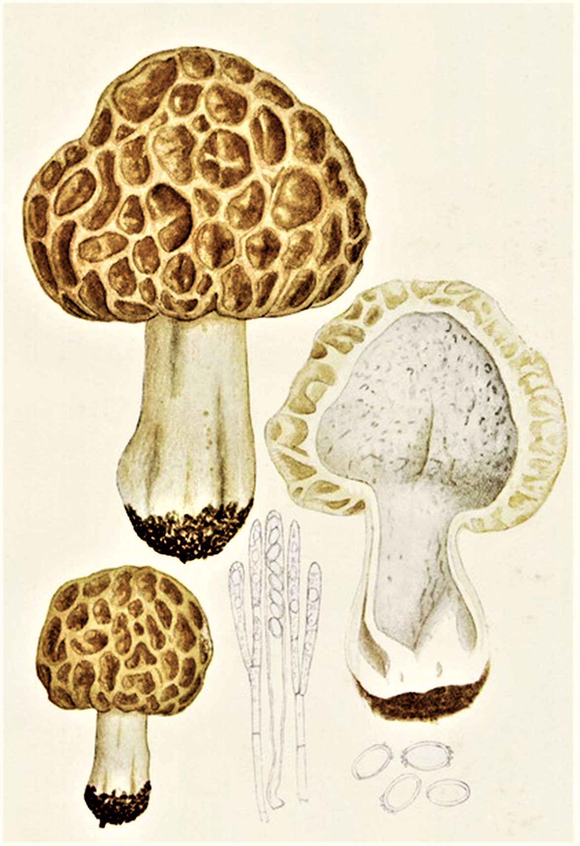 Giacomo Bresadola: Morchella rotunda (Pers., 1801) Boud. (1907)